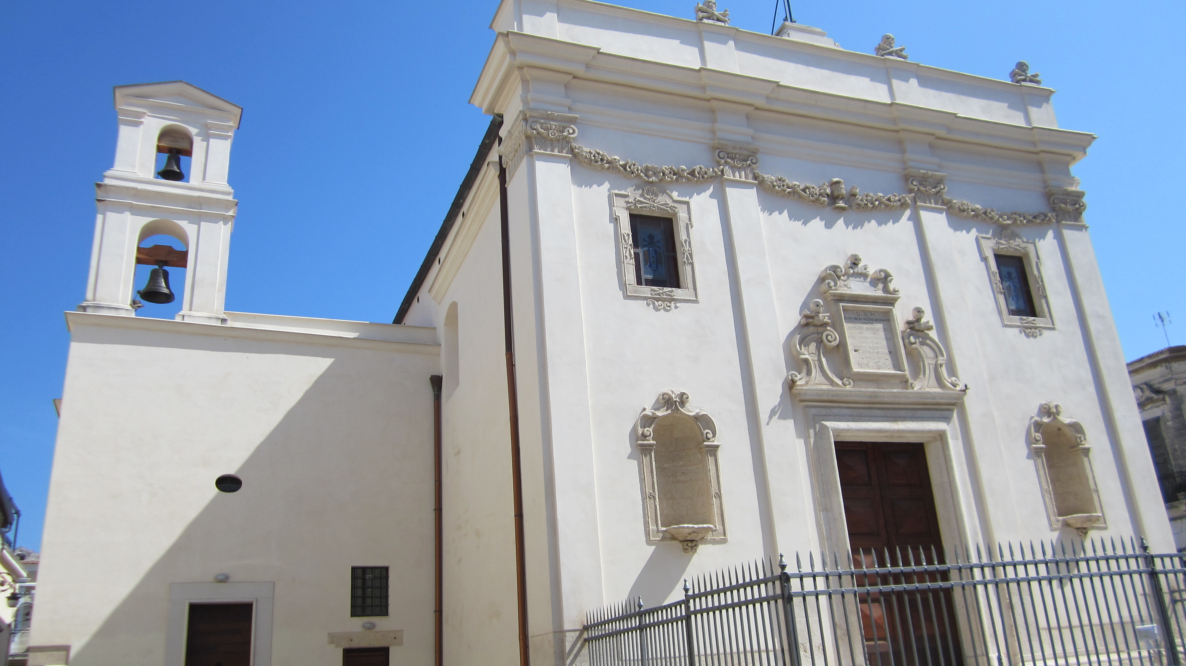 Foggia, Chiesa del Purgatorio